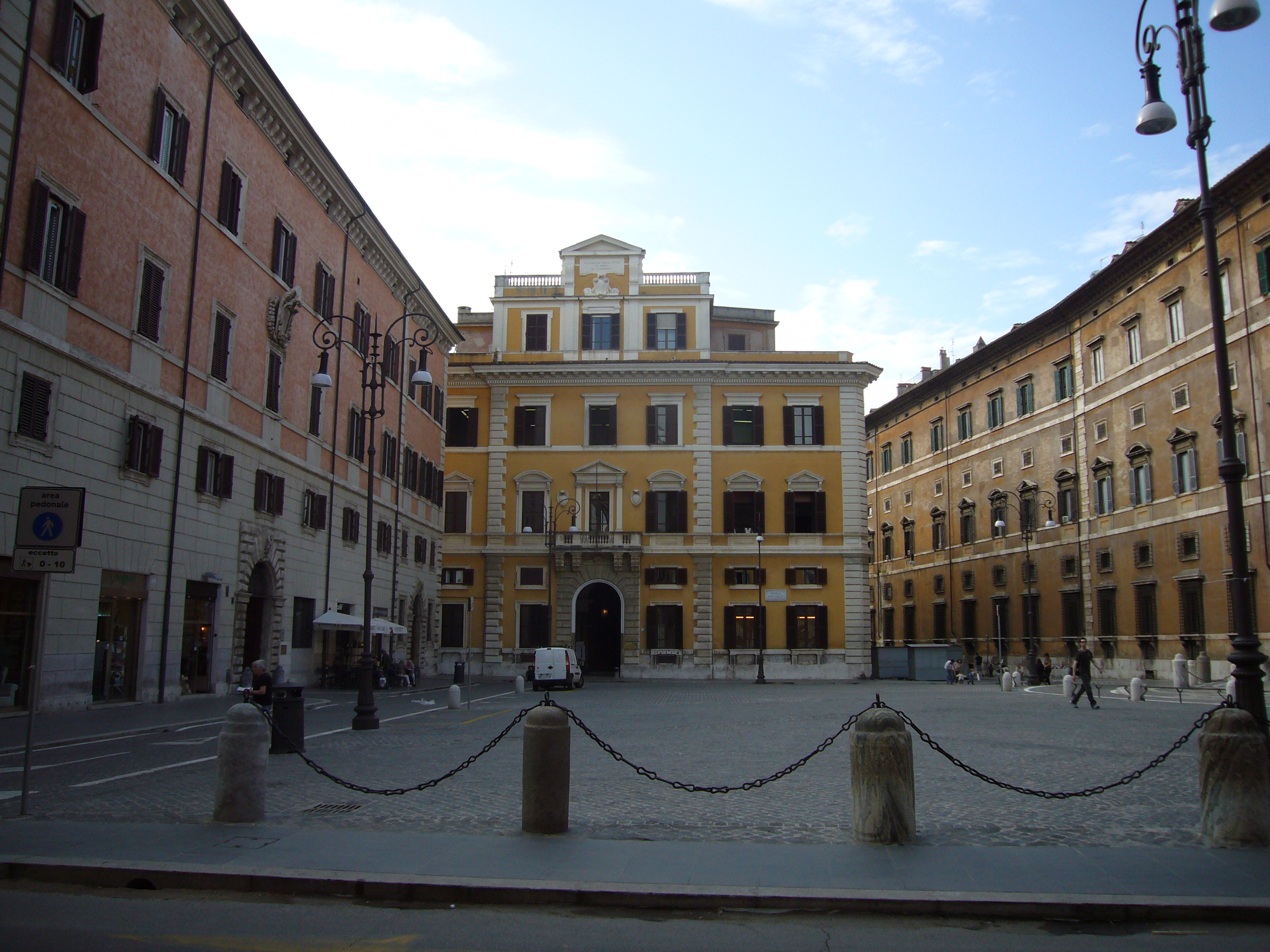 Roma, piazza Borghese: a destra il fianco di palazzo Borghese, a sinistra il palazzo della famiglia Borghese, di fronte la sede della Facoltà di Architettura della Sapienza